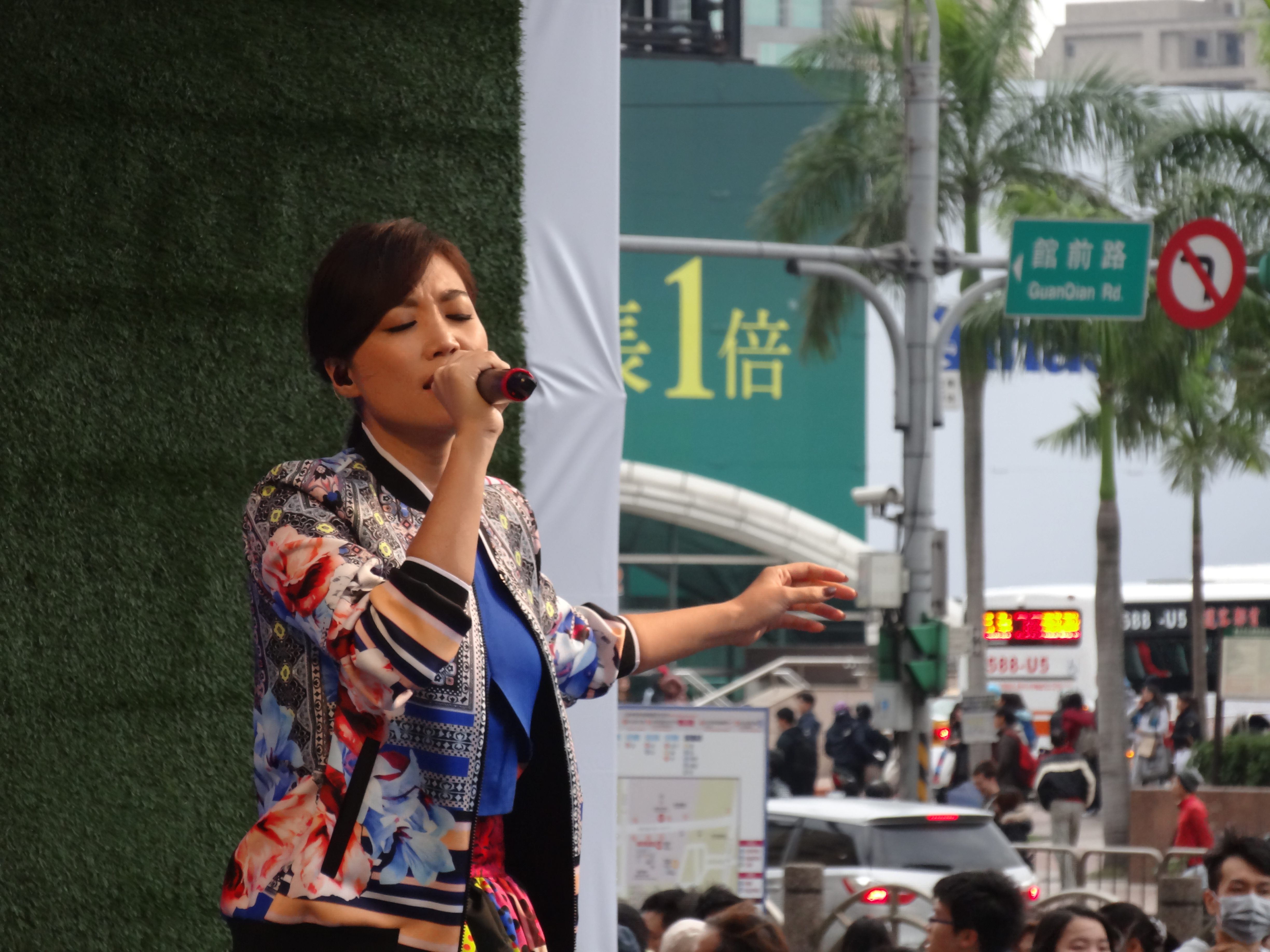 A-Lin於第七張個人專輯《罪惡感》預購簽唱會上演出，2014年。